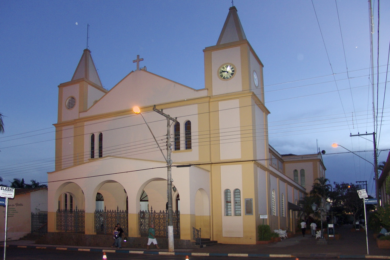 Foto do município de Cesário Lange, São Paulo, Brasil